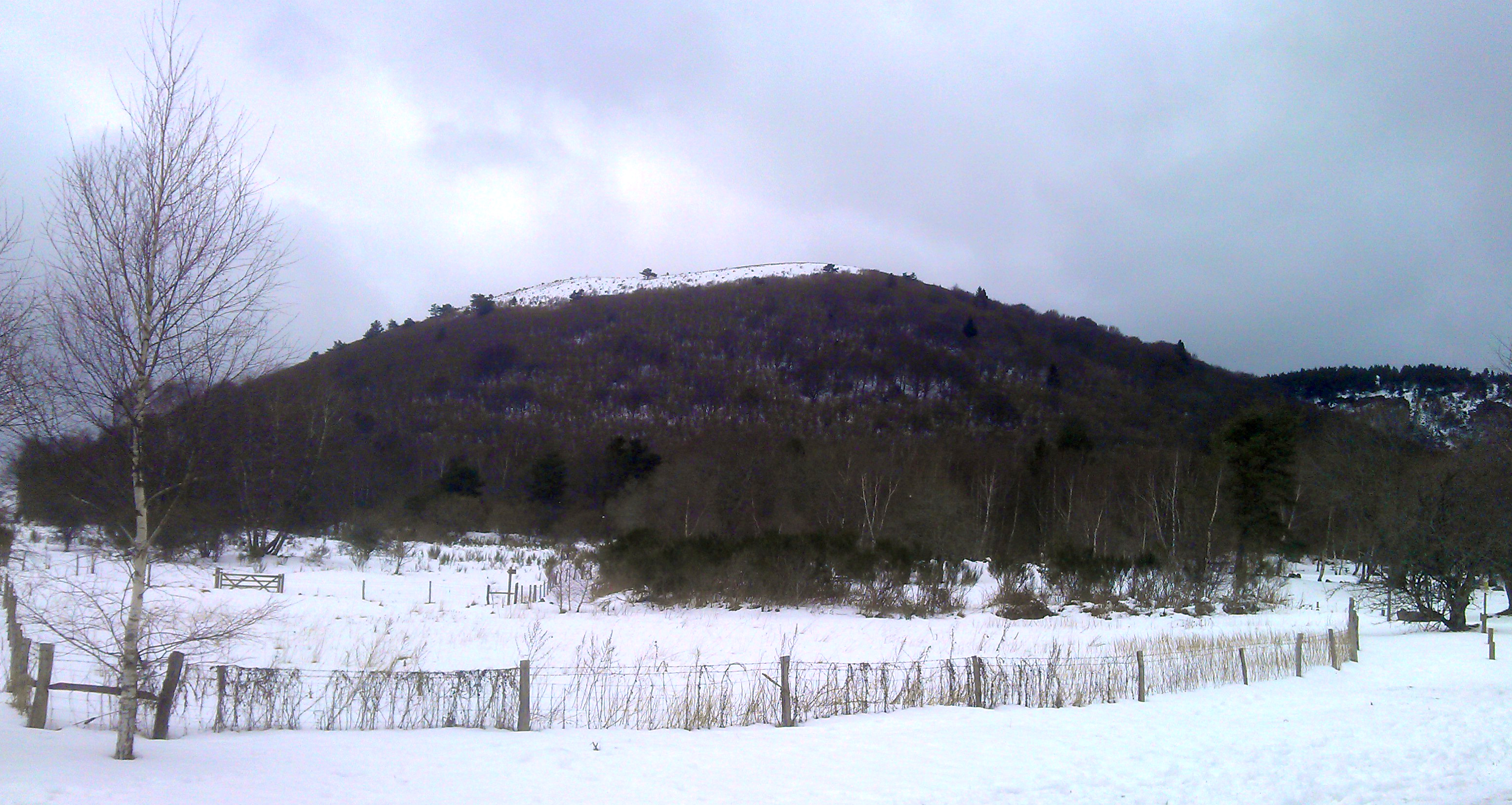 Puy des Goules (63) sous la neige